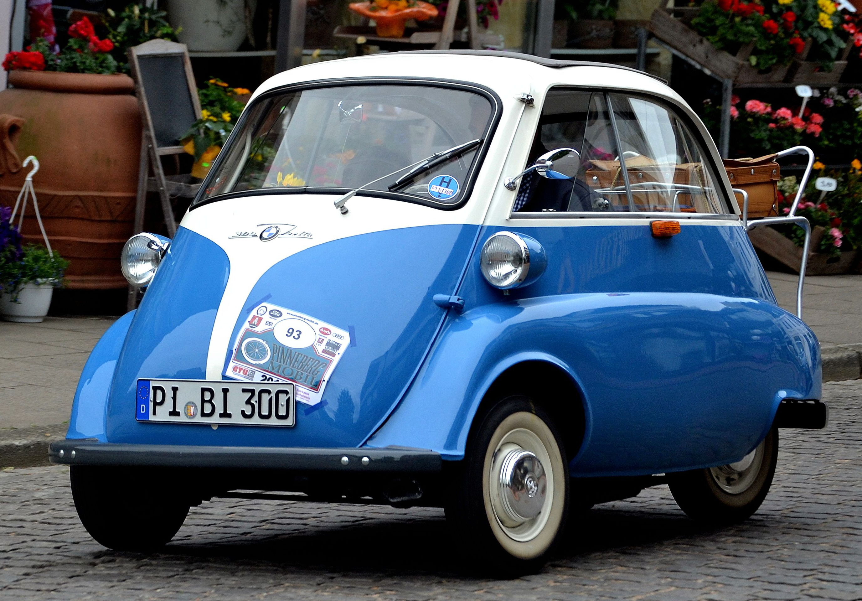 BMW Isetta Baujahr 1958 während der Pinneberg Mobil beim Eintreffen in Uetersen